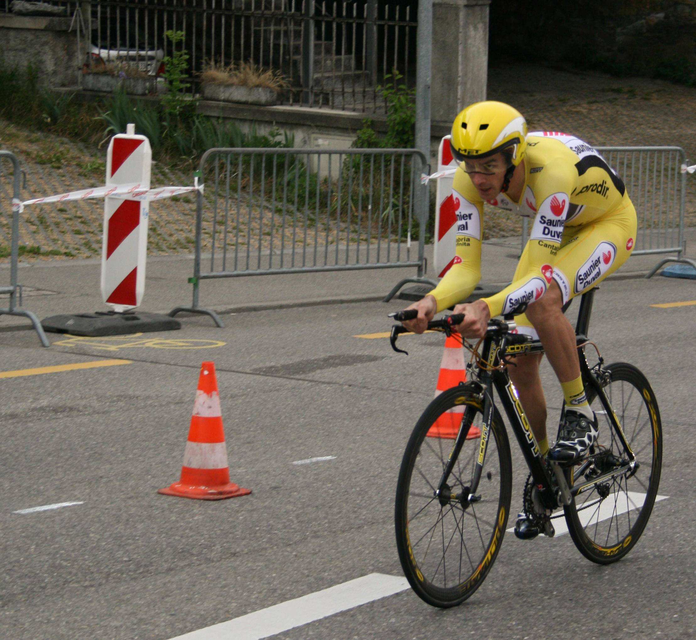 David Millar prologue du Tour de Romandie 2007